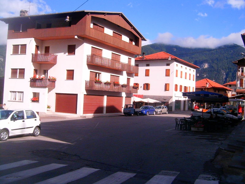 Calalzo_di_Cadore, Italy